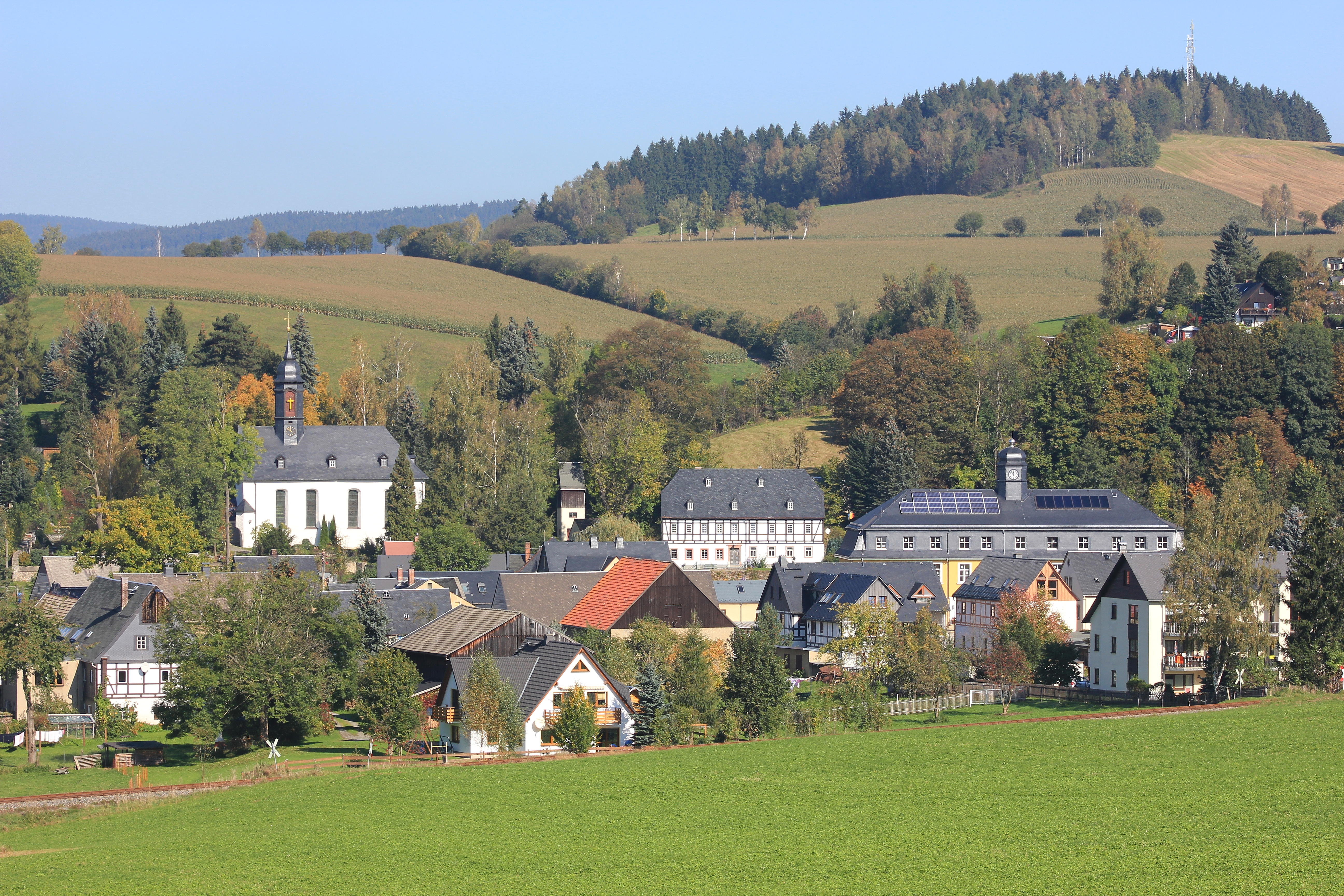 Markersbach. Sachsen. Erzgebirgskreis.